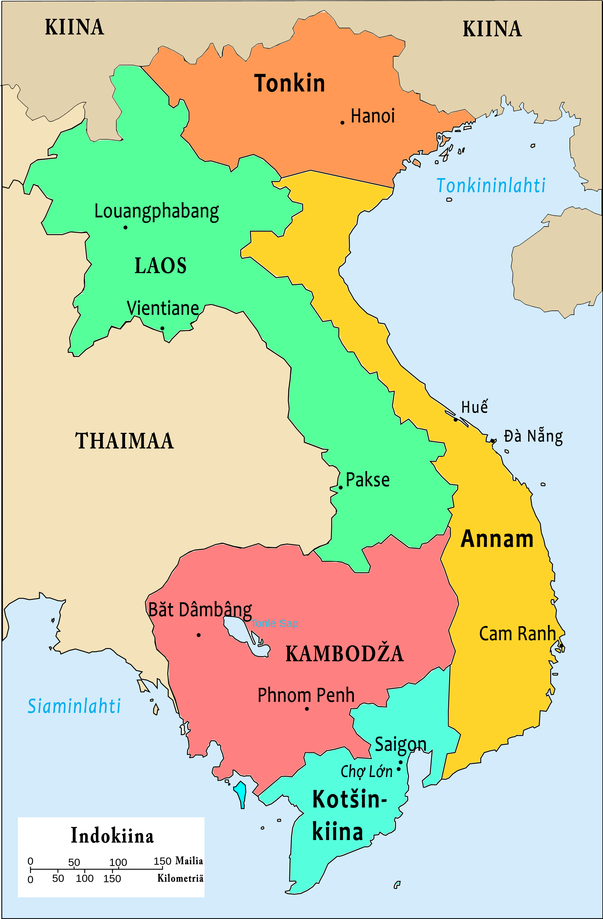 Kartta Ranskan Indokiinan aluejaosta. Tonkin, Annam ja Kotšinkiina muodostavat suurinpiirtein nykyisen Vietnamin alueen. Note: This work is derivative work based on file uploaded to Wikimedia Commons by the user:Bearsmalaysia.